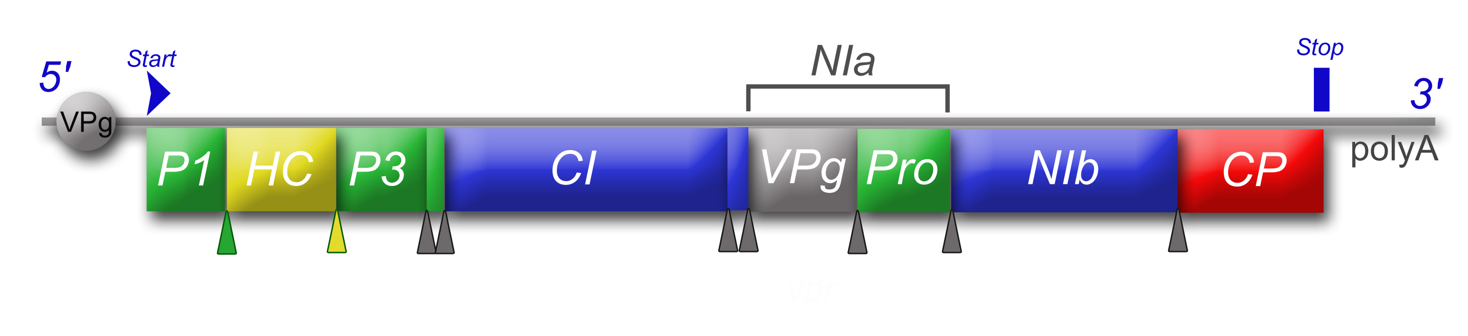 Genomorganisation des Lily-Mottle-Virus: P1 (protease 1), HC (helper component), P3 (protease 3), CI (cylindrical inclusions protein), VPg (genomic virus protein), Pro (protease), NI (nuclear inclusions protein), CP (capsid/coat protein).